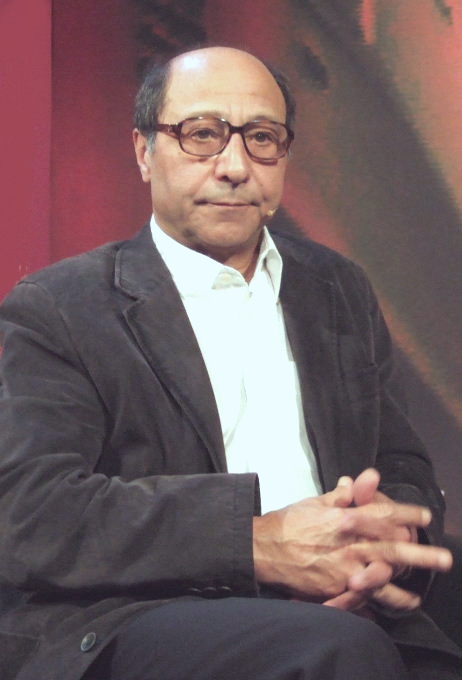 Bahman Nirumand Aufnahme: 6.10.2006 Url